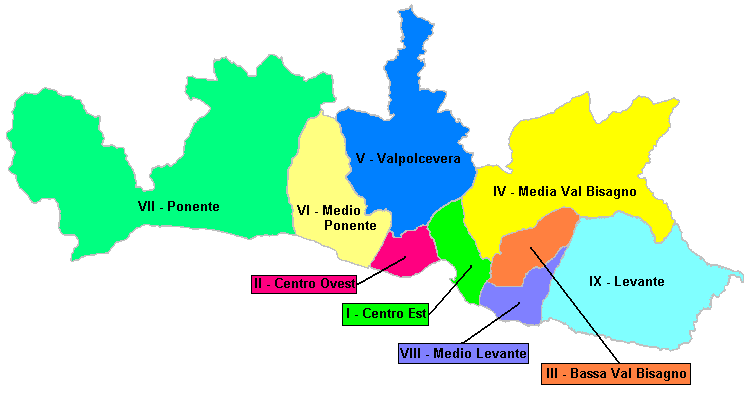 Suddivisione amministrativa del Comune di Genova